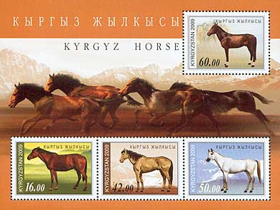 "Kyrgyz horse" 569-572, number by Kyrgyz catalogue